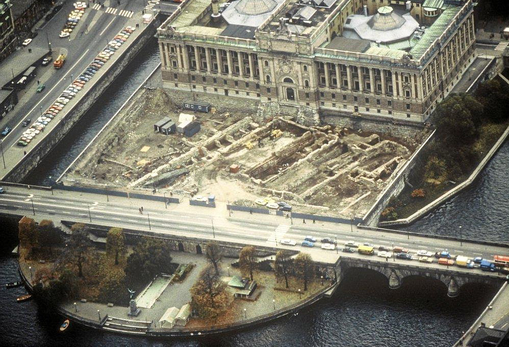 "Riksgropen", utgrävning på Helgeandsholmen 1978-1980